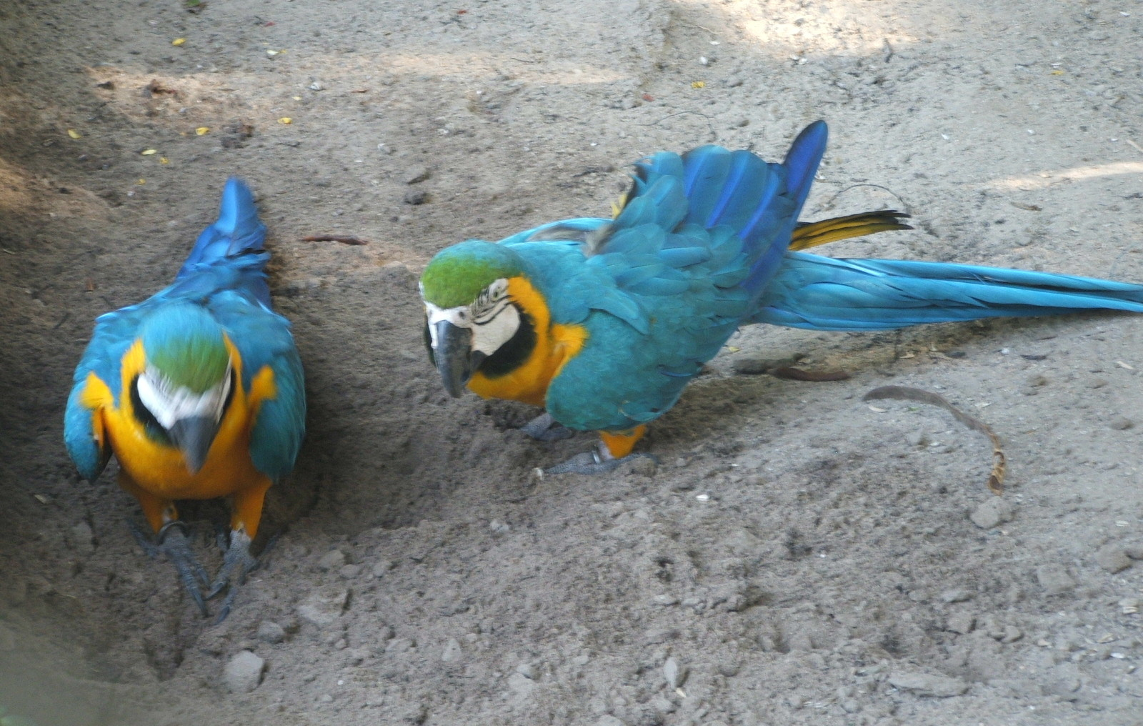 Ara ararauna ou Arara-canindé